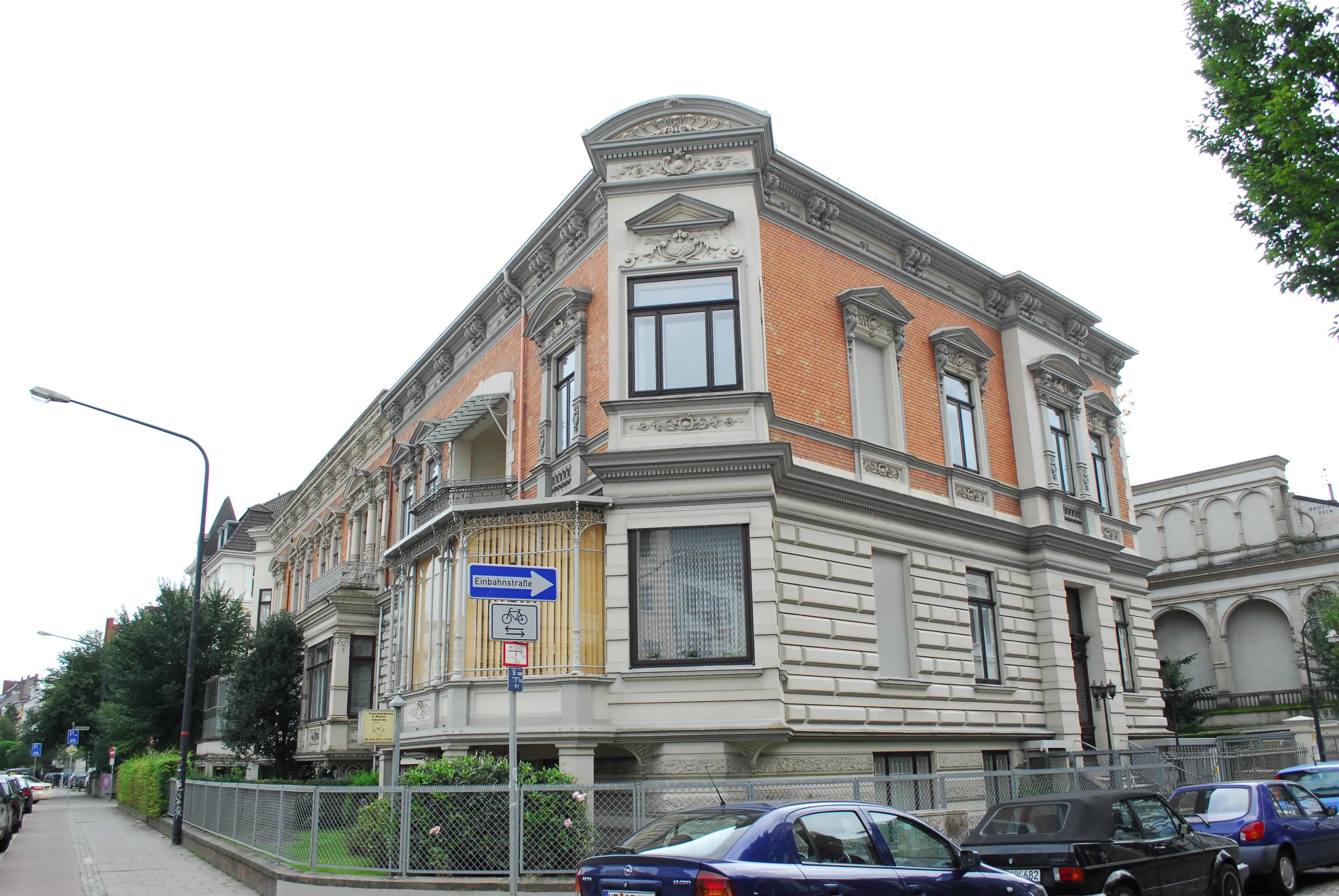 Wohnhaus in Bremen, Besselstraße 91 / Bismarckstraße.Das abgebildete Objekt ist ein geschütztes Kulturdenkmal in der Freien Hansestadt Bremen, mit der Nr. 0170 beim Landesamt für Denkmalpflege registriert.